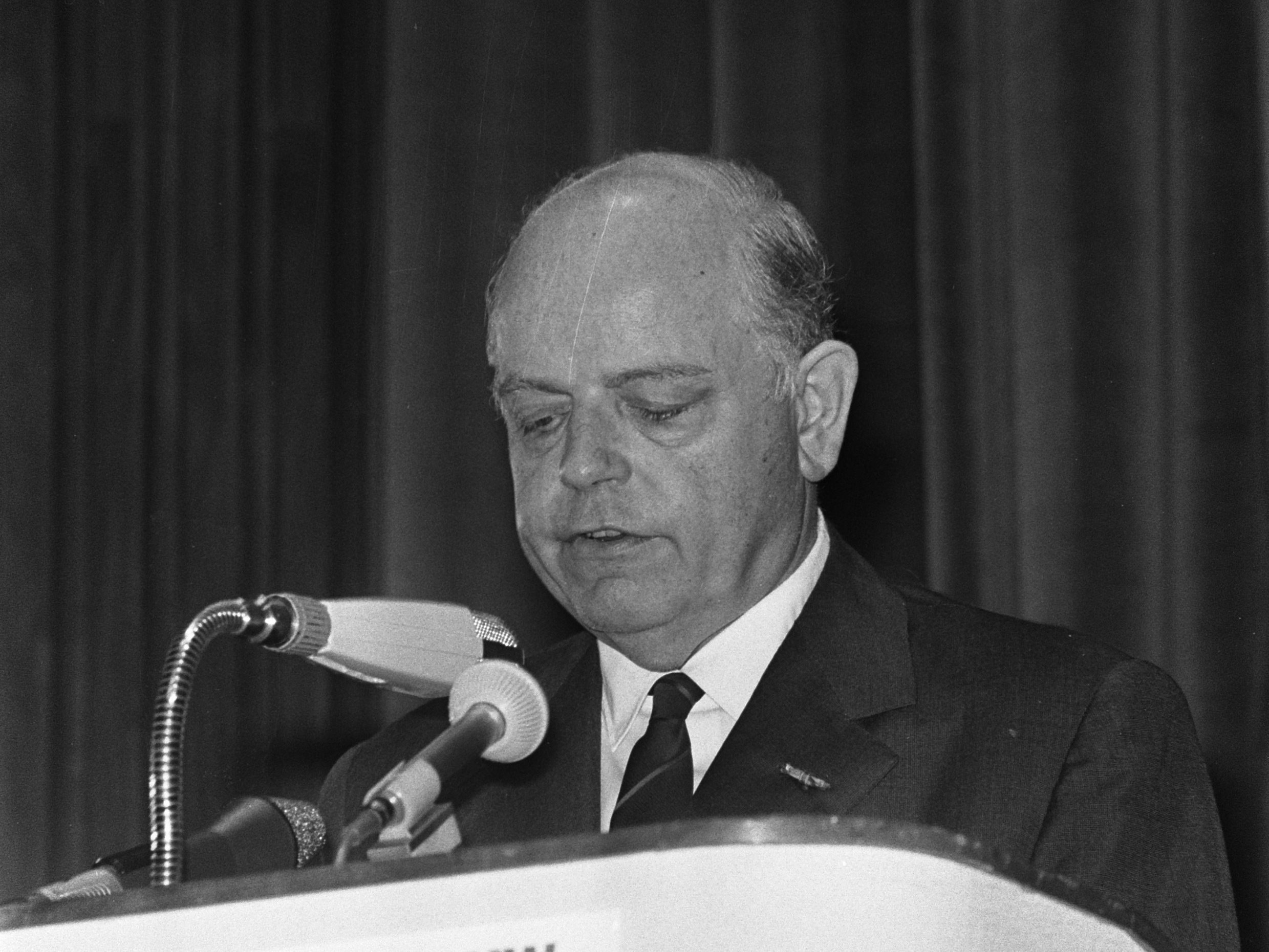 Tweede Wereldvoedselcongres in Den Haag ; dr. Boerma aan het woord.